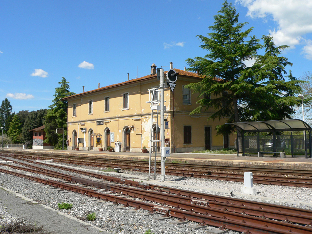 Vista completa della stazione di Asciano